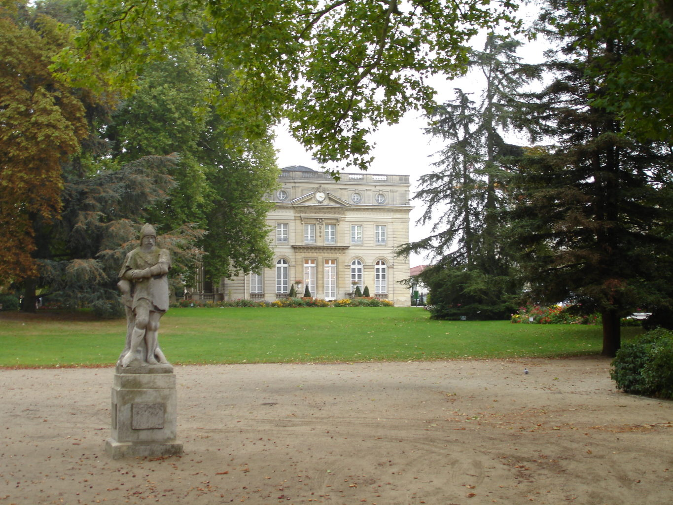 Hôtel de ville de Montmorency (France), façade ouest.